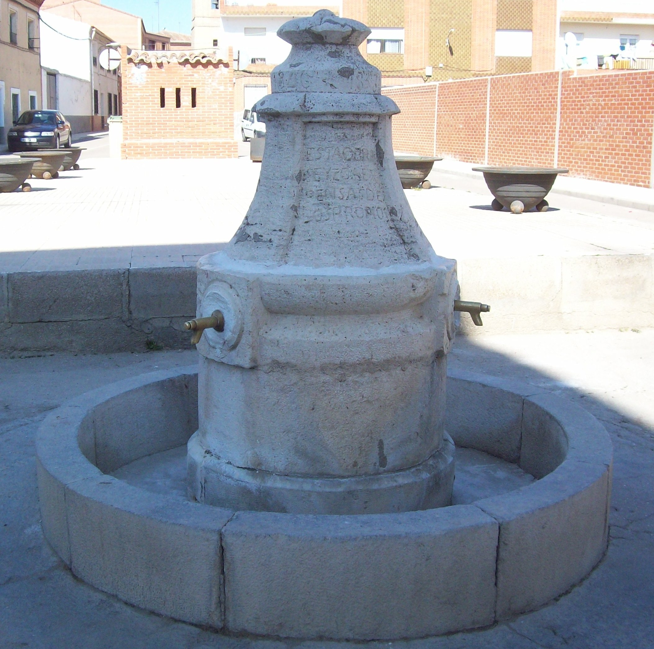 Fuente de agua de Cobeja, data de 1702, y puede leerse en ella: REINANDO CARLOS IIII ANO DE 1702; SIENDO ALCALDE CELESTINO FERNANDES; ESTA OBRA SEYZO A EXPENSAS DE LOS PROPIOS